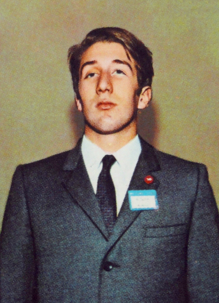 Figurina CAMPIONI DELLO SPORT 1969/70-n.418-ZUCCHI (ITA)-SCI NAUTICO-rec